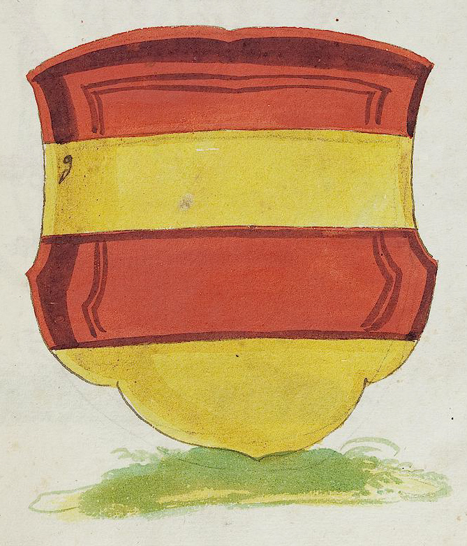 Wappen aus: David Wolleber: Chorographia Württemberg, [Schorndorf] 1591, Universitätsbibliothek Tübingen, Mh 6,1 Wappen der Grafen von Truhendingen